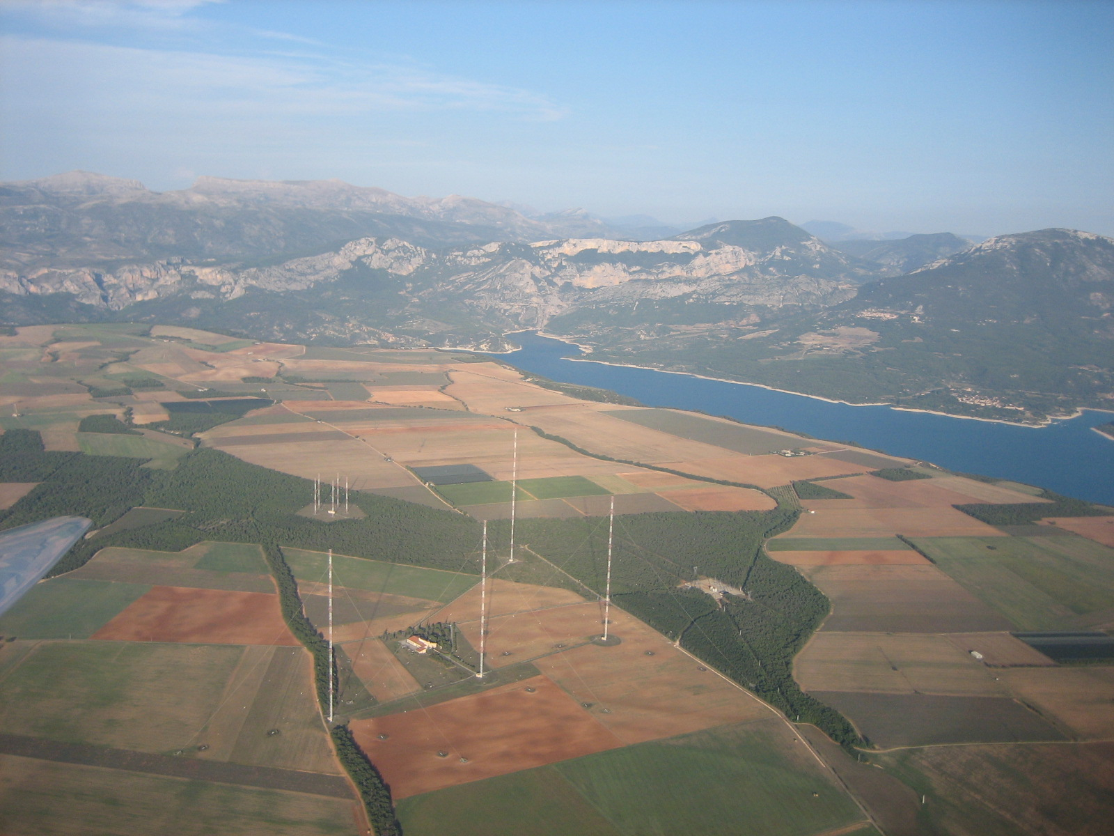 Sender Roumoules vom Segelflugzeug aus fotografiert.